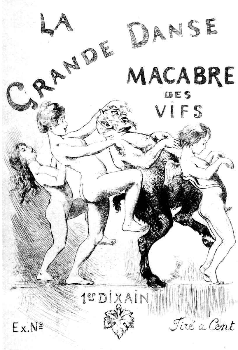 Dessins de Martin van Maele. Couverture d'un des quatres dizains de La Grande Danse macabre des vifs, 1905.